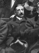 . Fot. Goñi